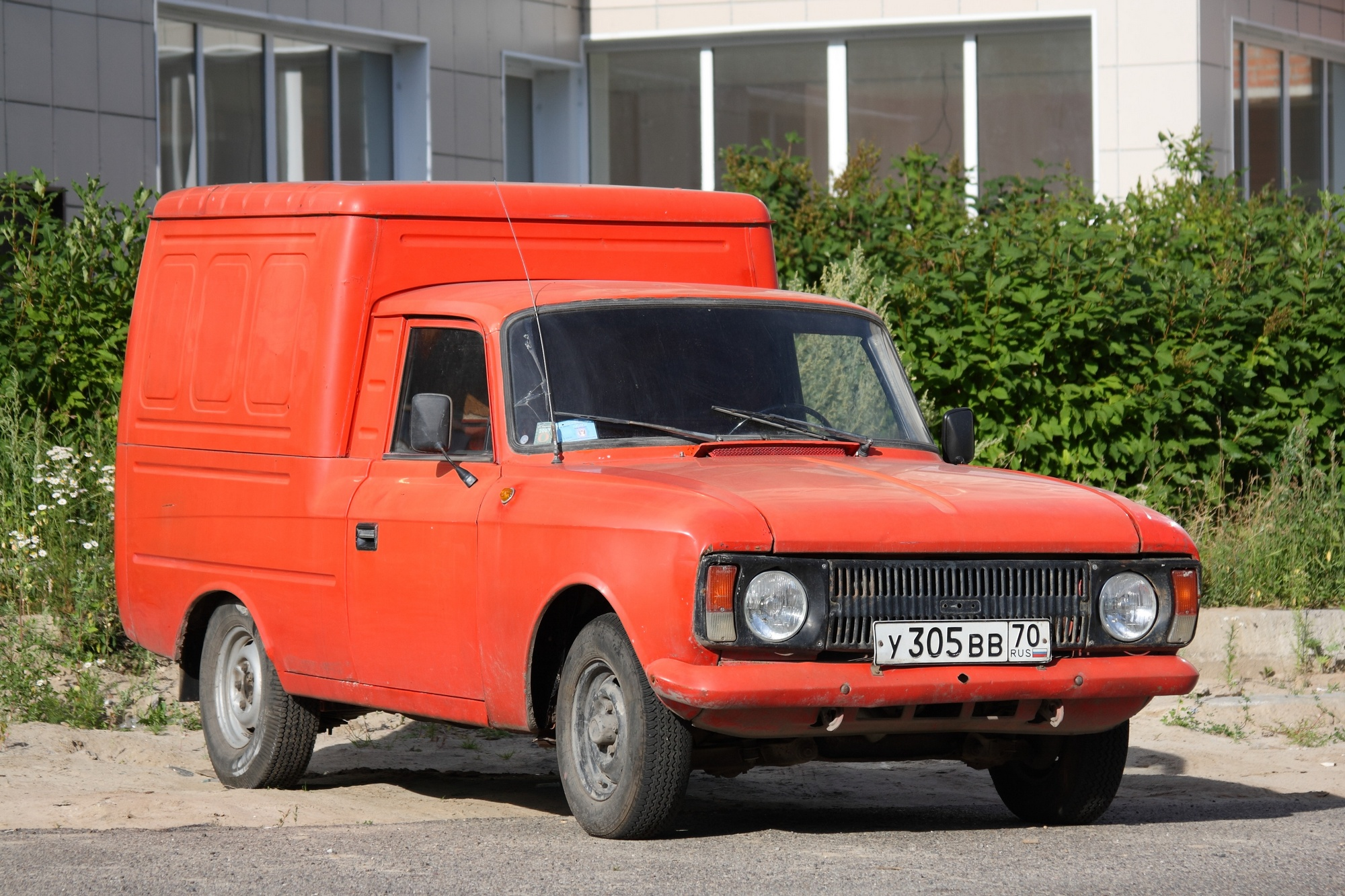 Иж 2715 в Северске, Томская область.